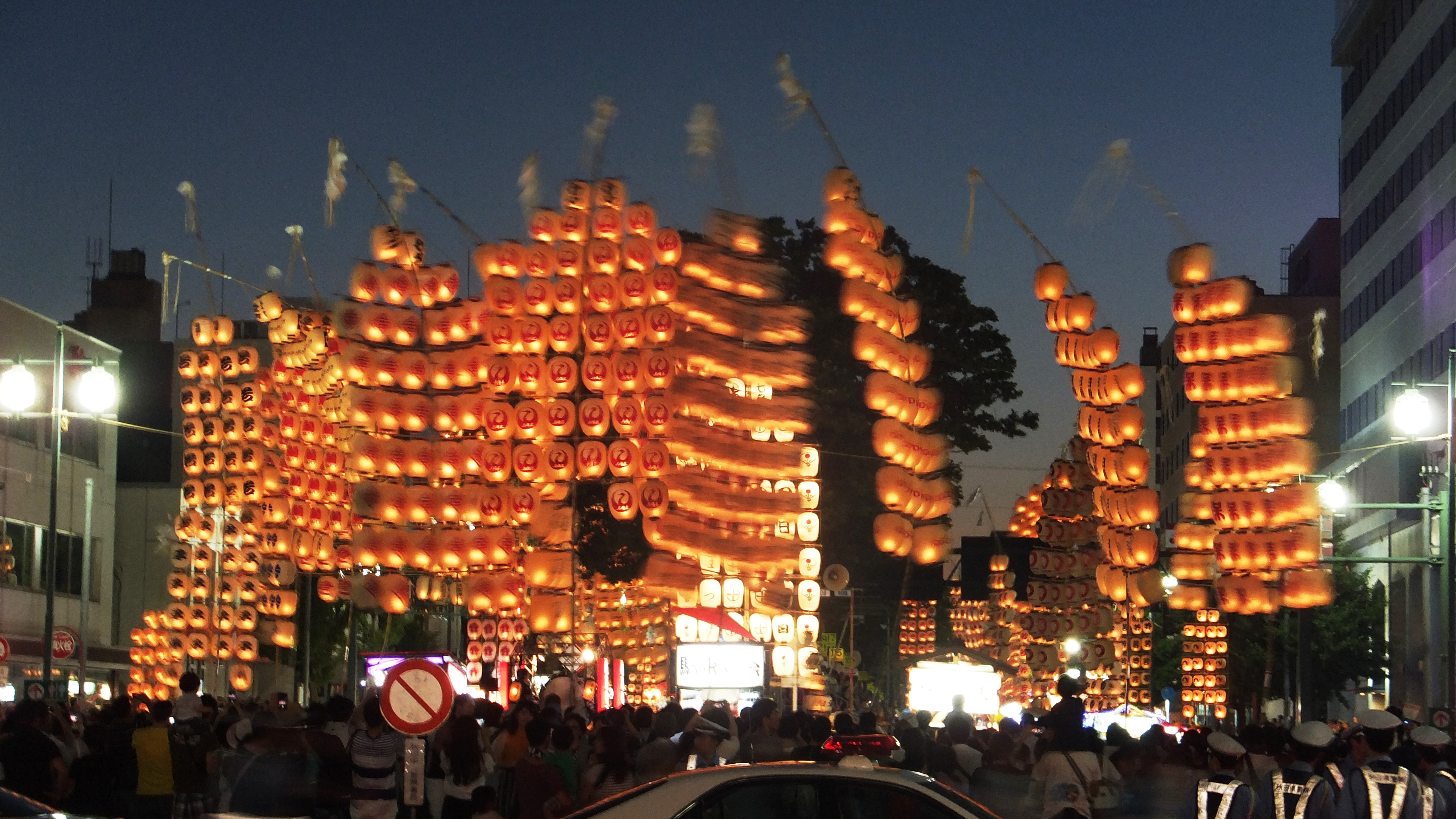 秋田竿燈祭り。二丁目橋付近にて